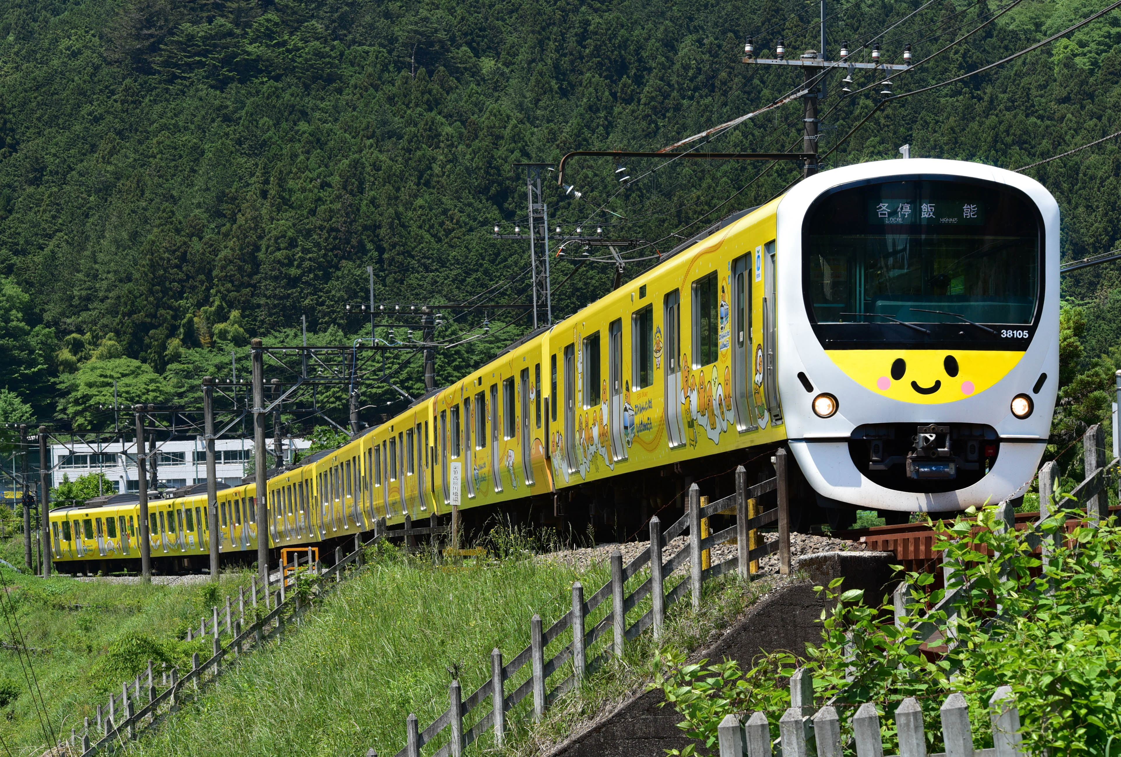 ぐでたまスマイルトレイン 30000系（38105F）池袋線 吾野～東吾野間 飯能方面（ぎゅでちゃま仕様） Nikon D750